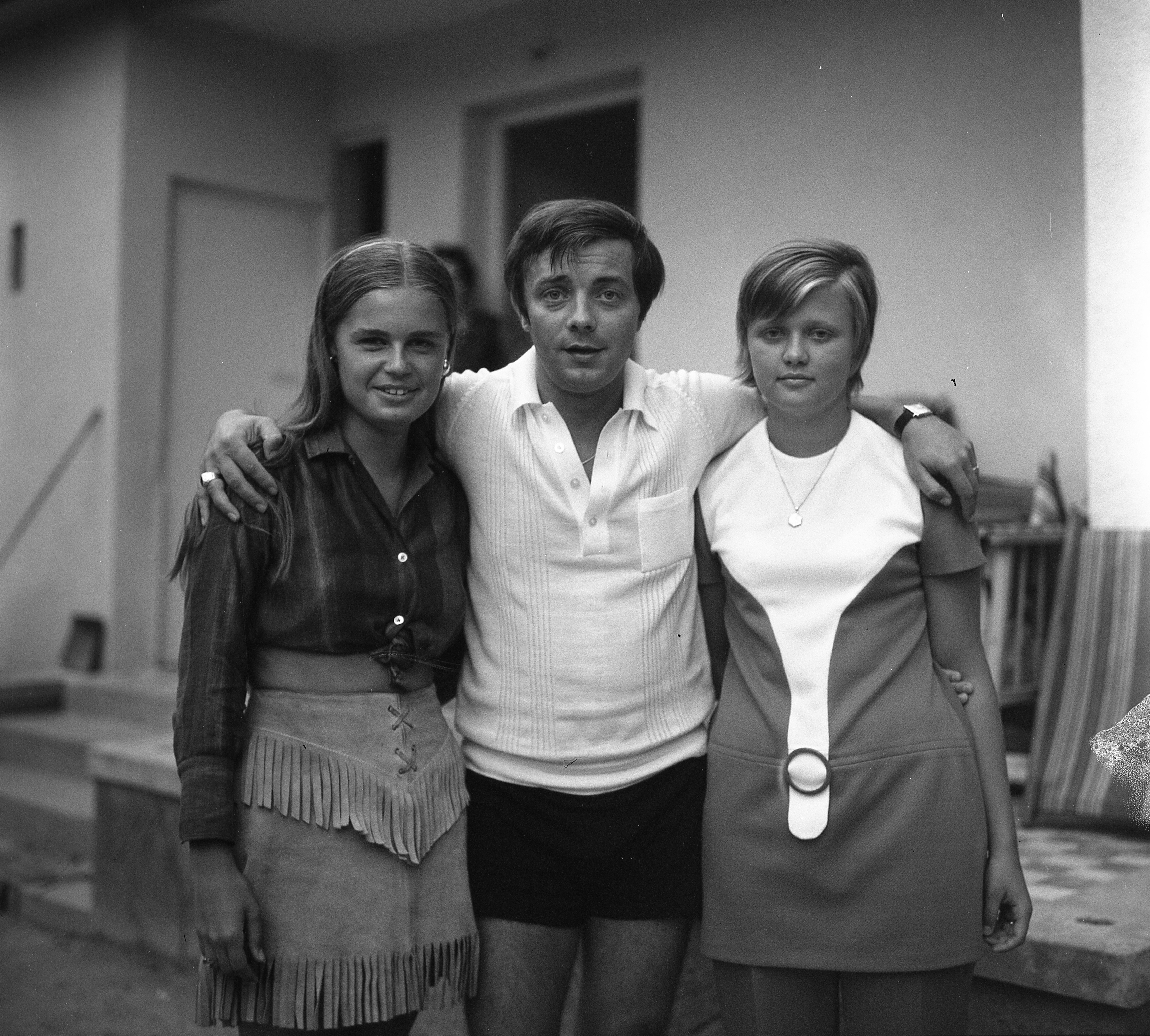 Aradszky László táncdalénekes. Location: Hungary Tags: tableau, women, celebrity Title: Aradszky László táncdalénekes.